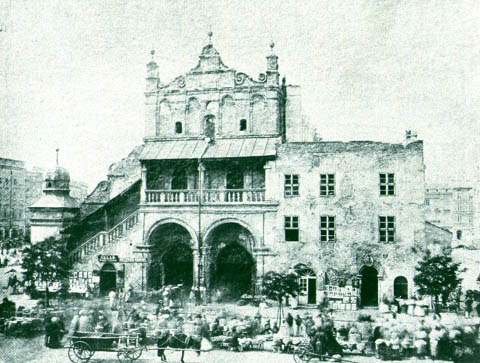 Sukiennice, wejście do smatruza, Syndykówka